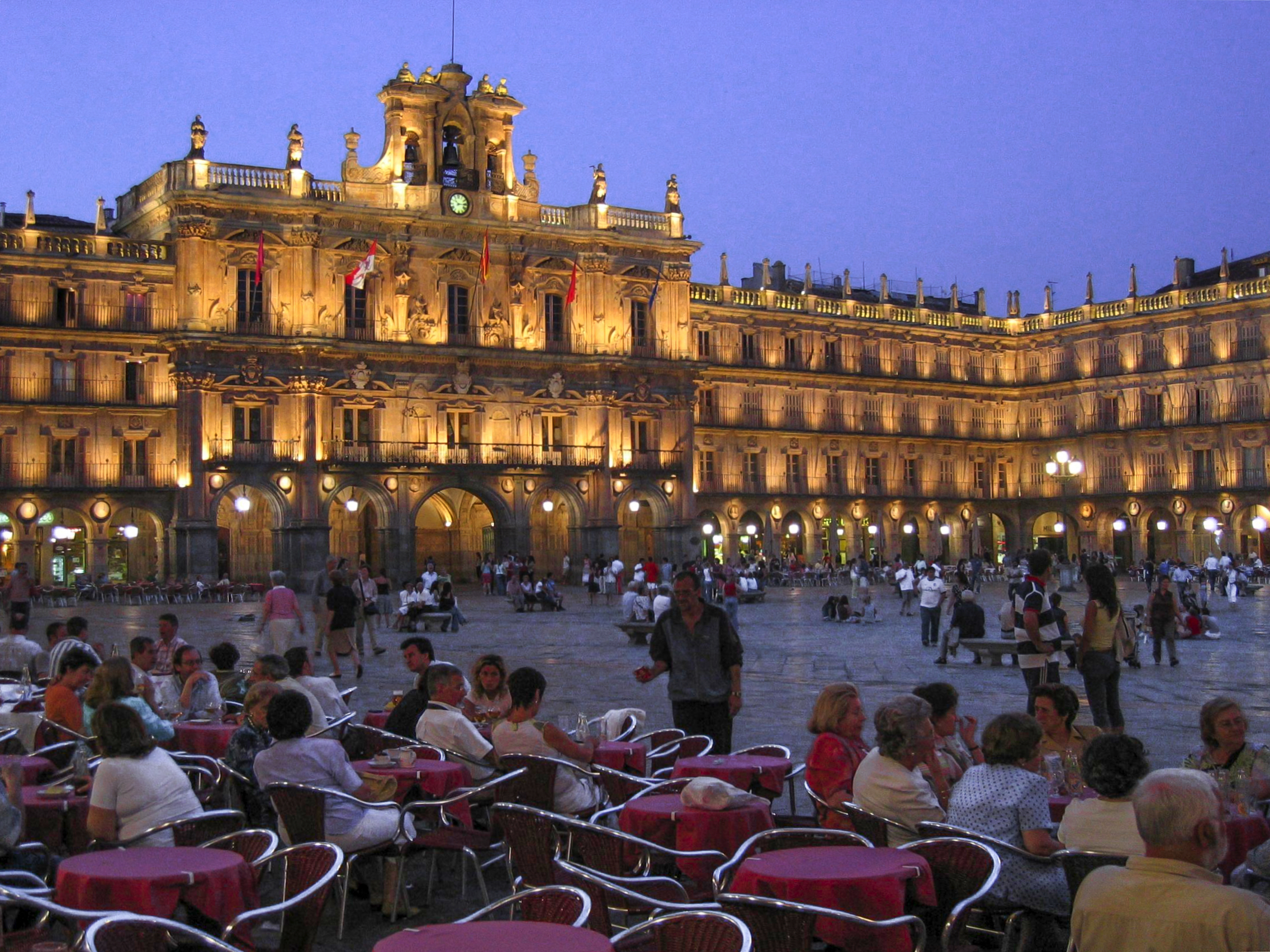 Salamanca, Plaza Mayor am frühen Abend